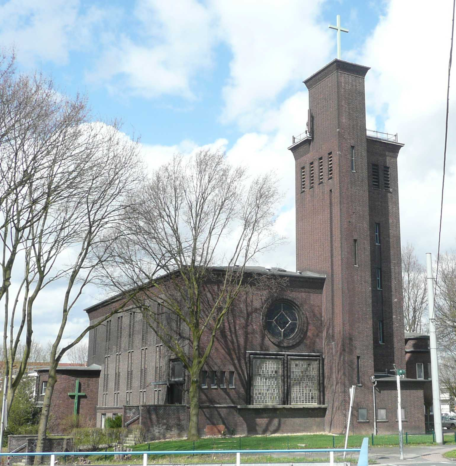 Epiphaniaskirche, Bochum, Hamme, Dorstener Str. 263, SELK, "Paketkirche", Autobahnkirche.